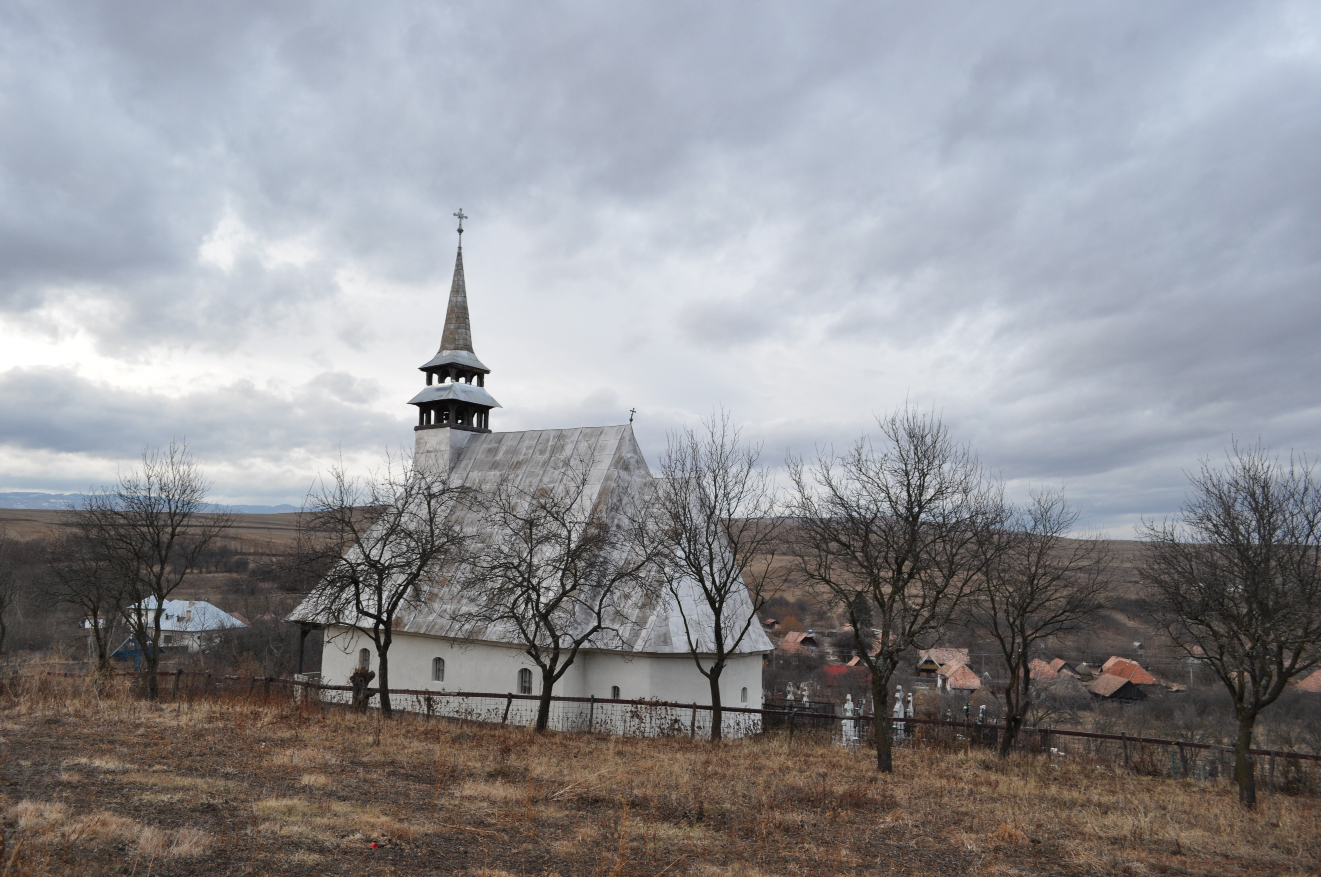 Biserica de lemn "Sfinții Arhangheli Mihail şi Gavriil" din Livada. județul Cluj